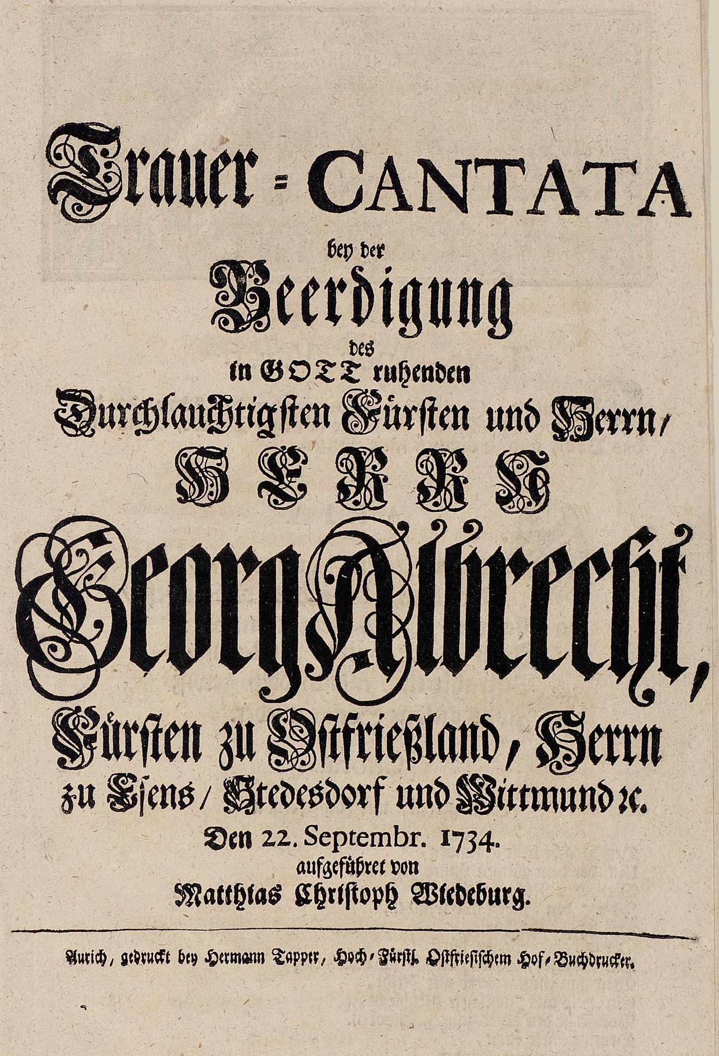 Titelbild des Textes der Trauerkantate für Fürst Georg Albrecht zu Ostfriesland von Matthias Christoph Wiedeburg, Aurich 1734